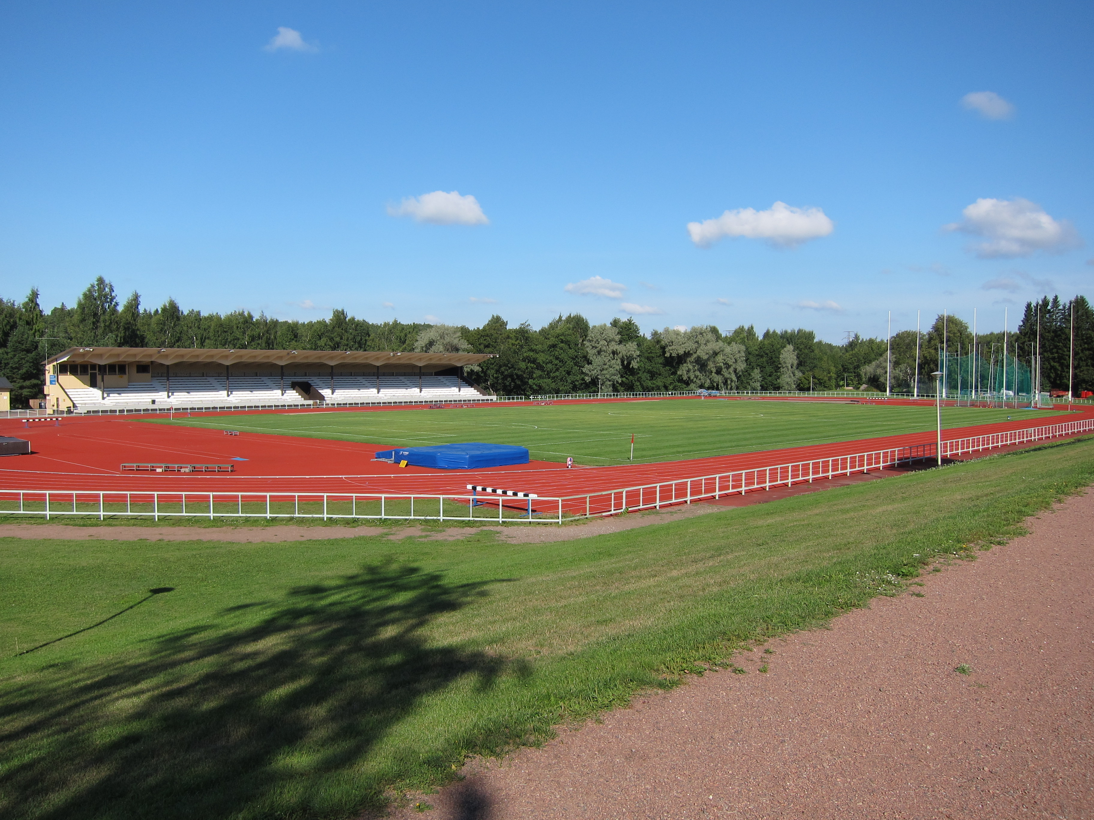 Karhulan keskuskenttä Kotkassa.